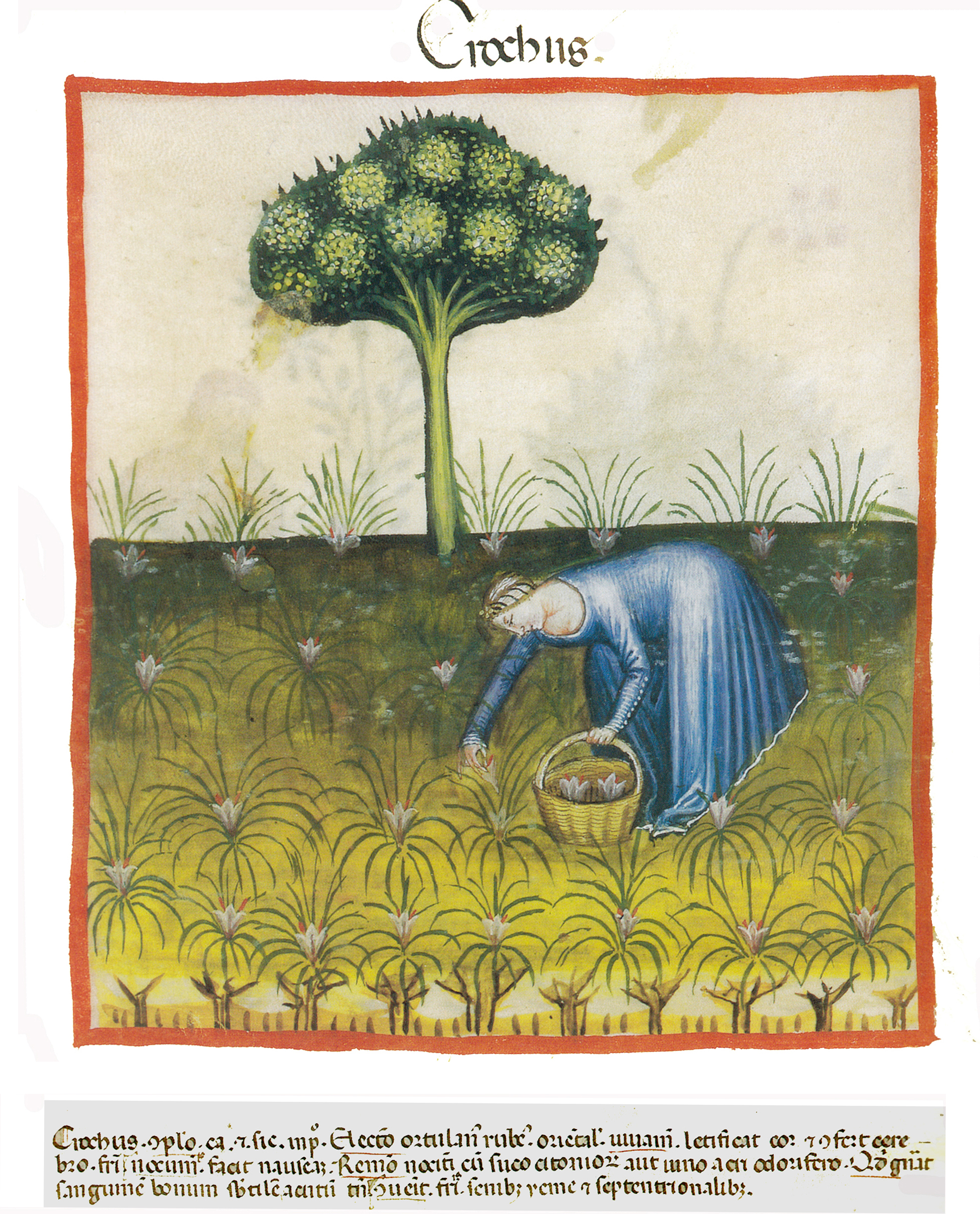 Abbildung von Crocus sativus - Saffran